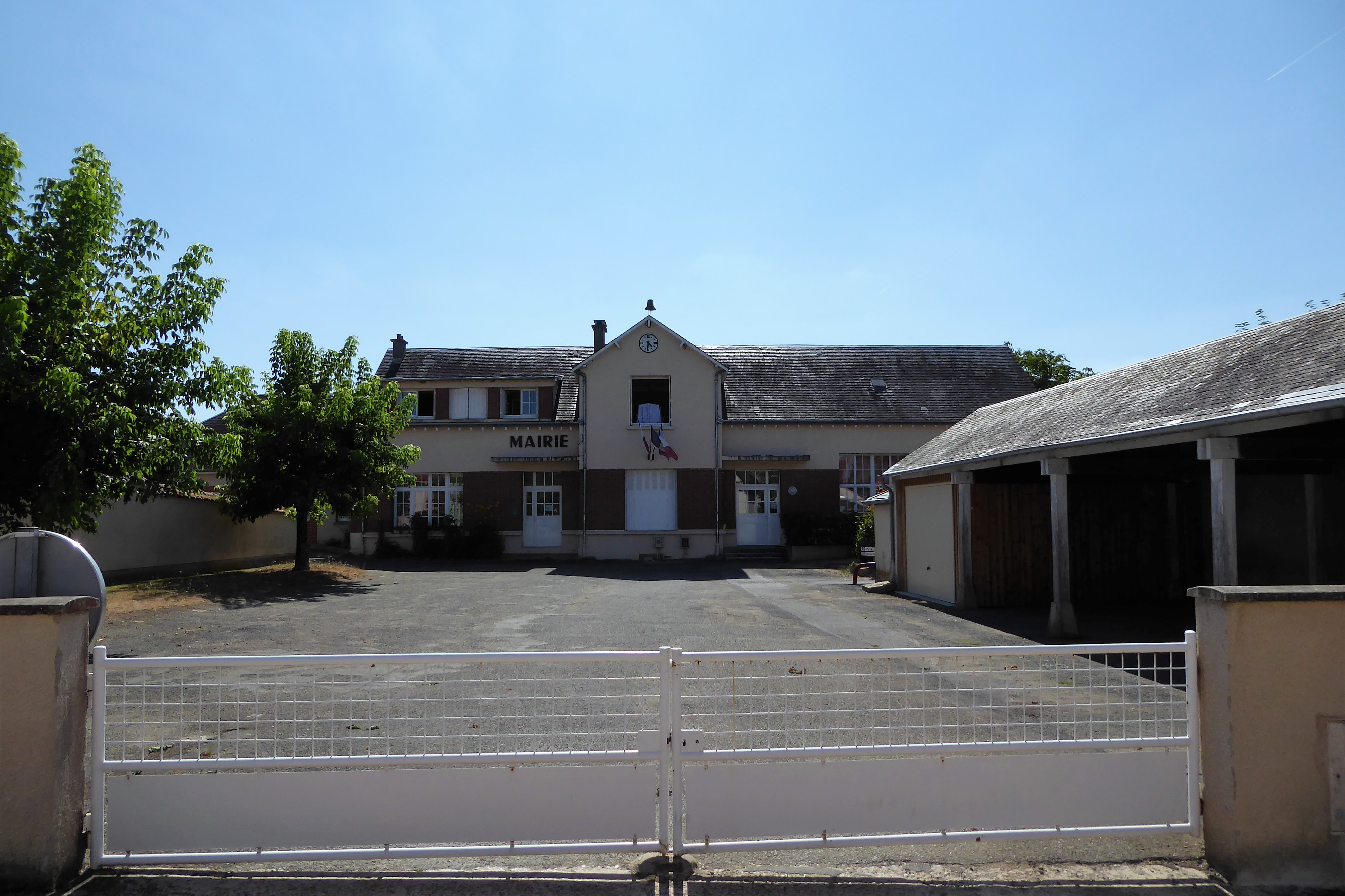 mairie de Mévoisins, Eure-et-Loir, France.